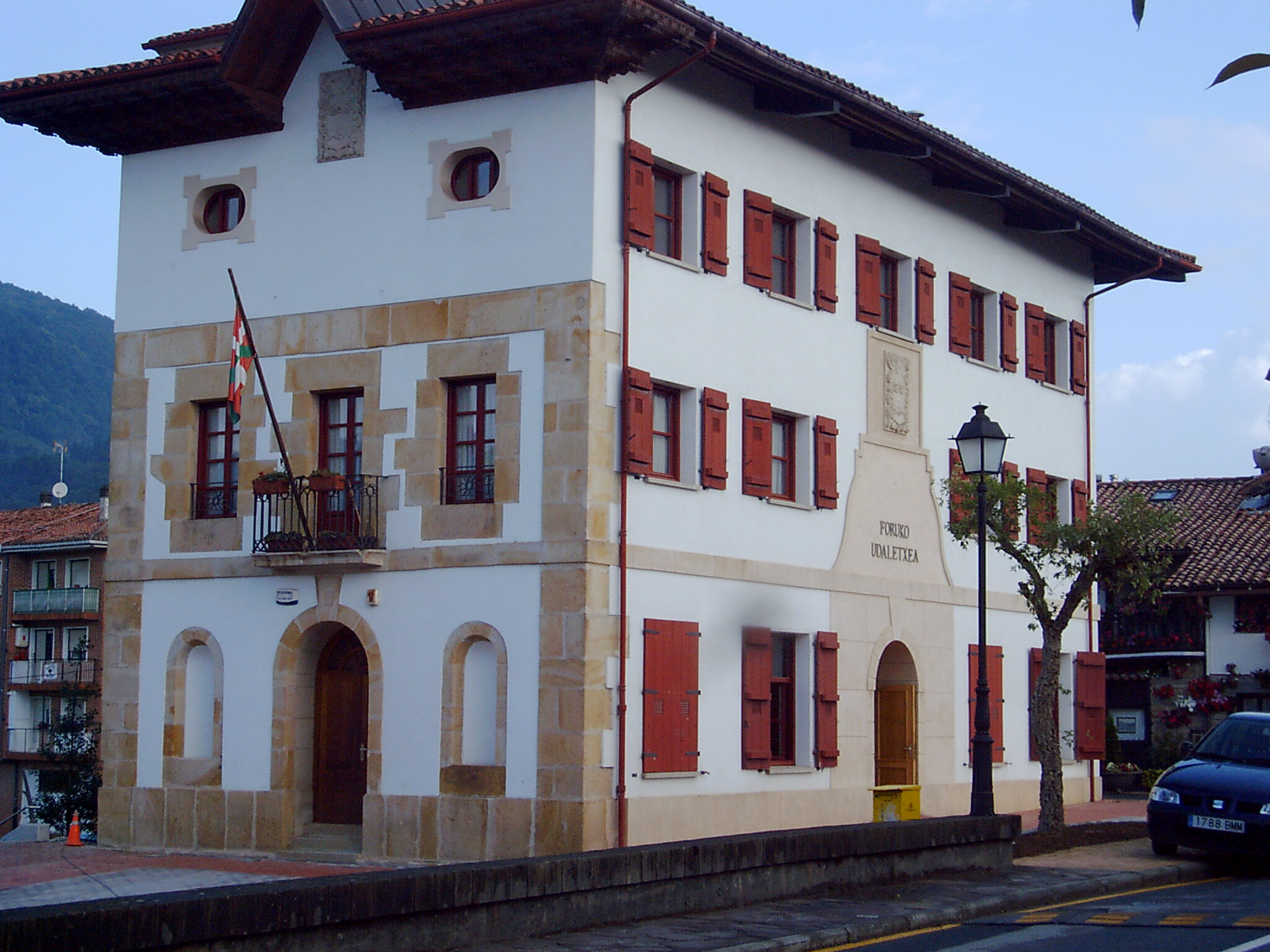 Forua udaletxea